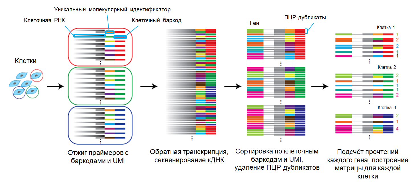 Секвенирование РНК одиночных клеток с использованием технологий UMI (уникальных клеточных идентификаторов) и клеточных баркодов[1].